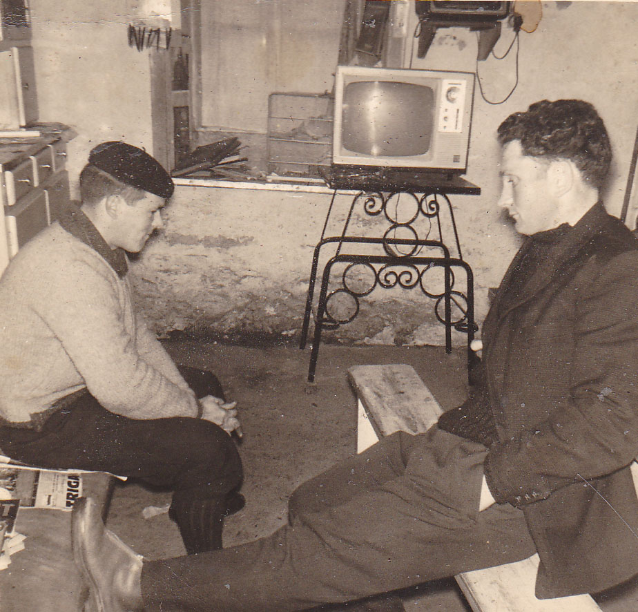 Surnommé le "Forgeron de Botsorhel", il est, ici, à droite de la photo, à Botsorhel.